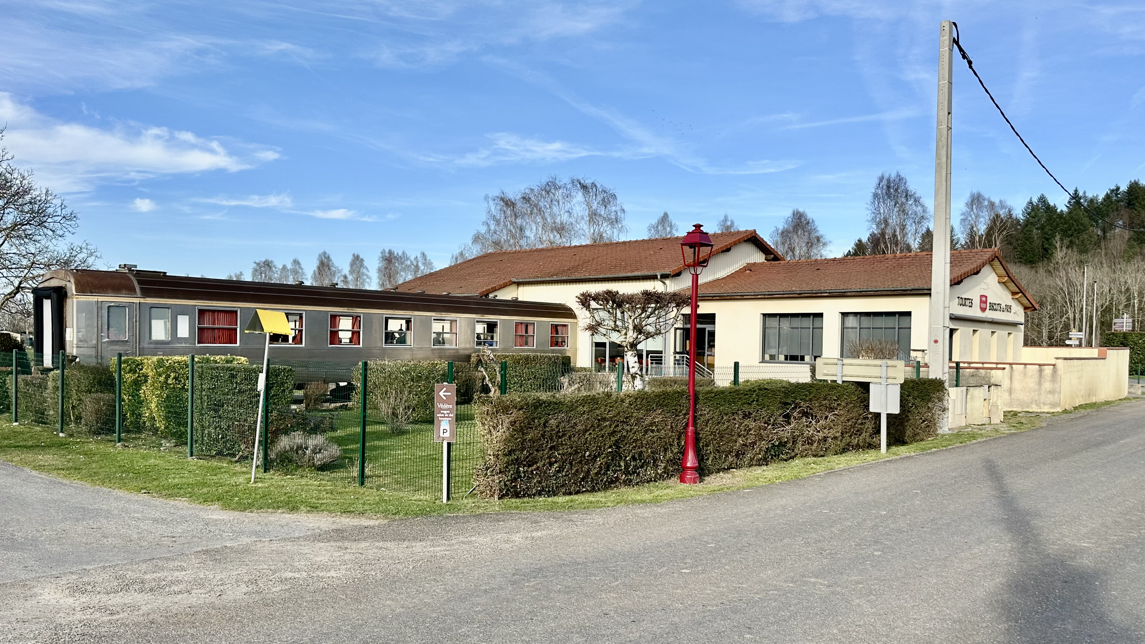 Salon de thé Védère (Montgaillard, Hautes-Pyrénées, France)